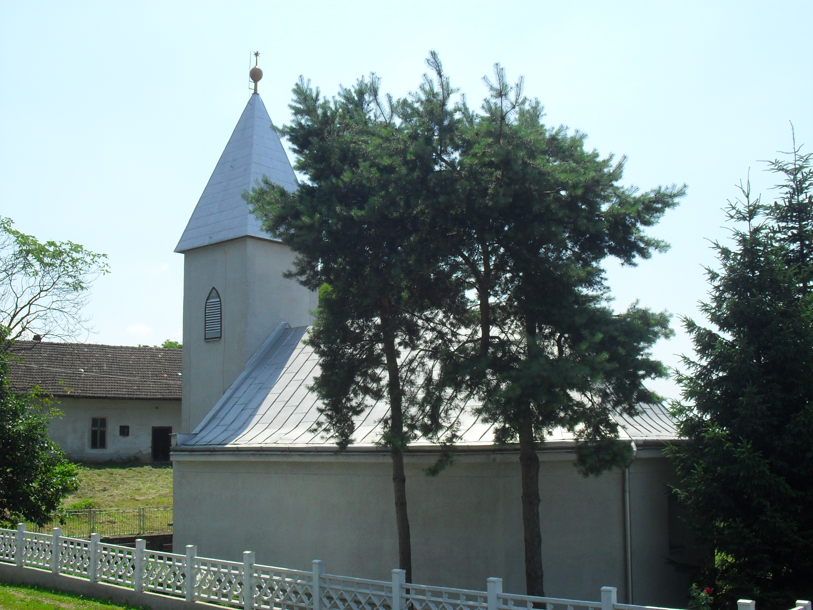 Imreg - református templom